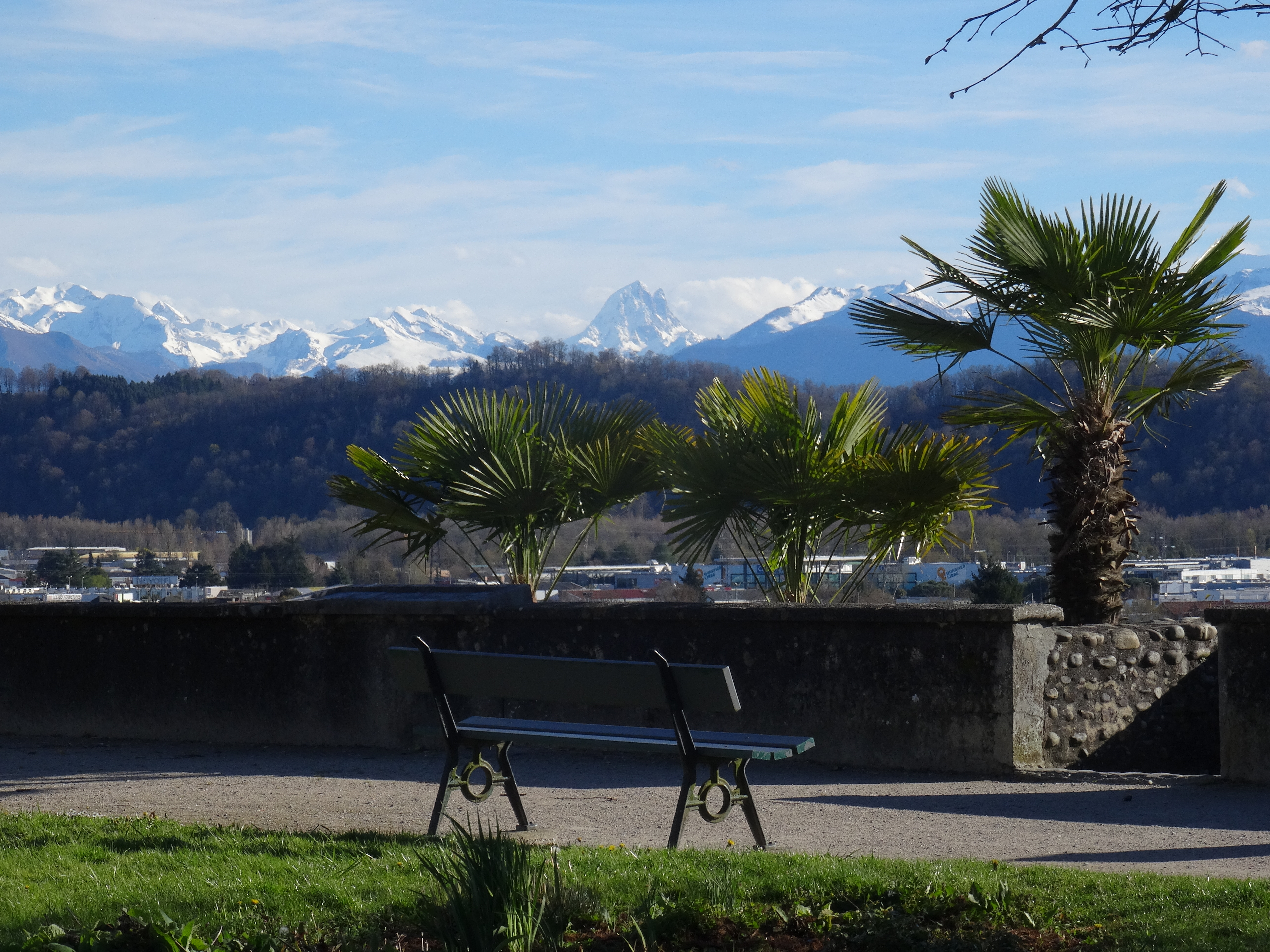 Vue depuis la place royale de Lescar